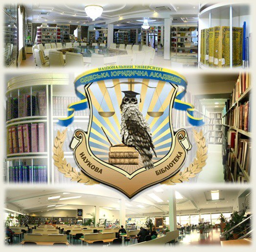 Наукова бібліотека Національного університету "Одеська юридична академія"